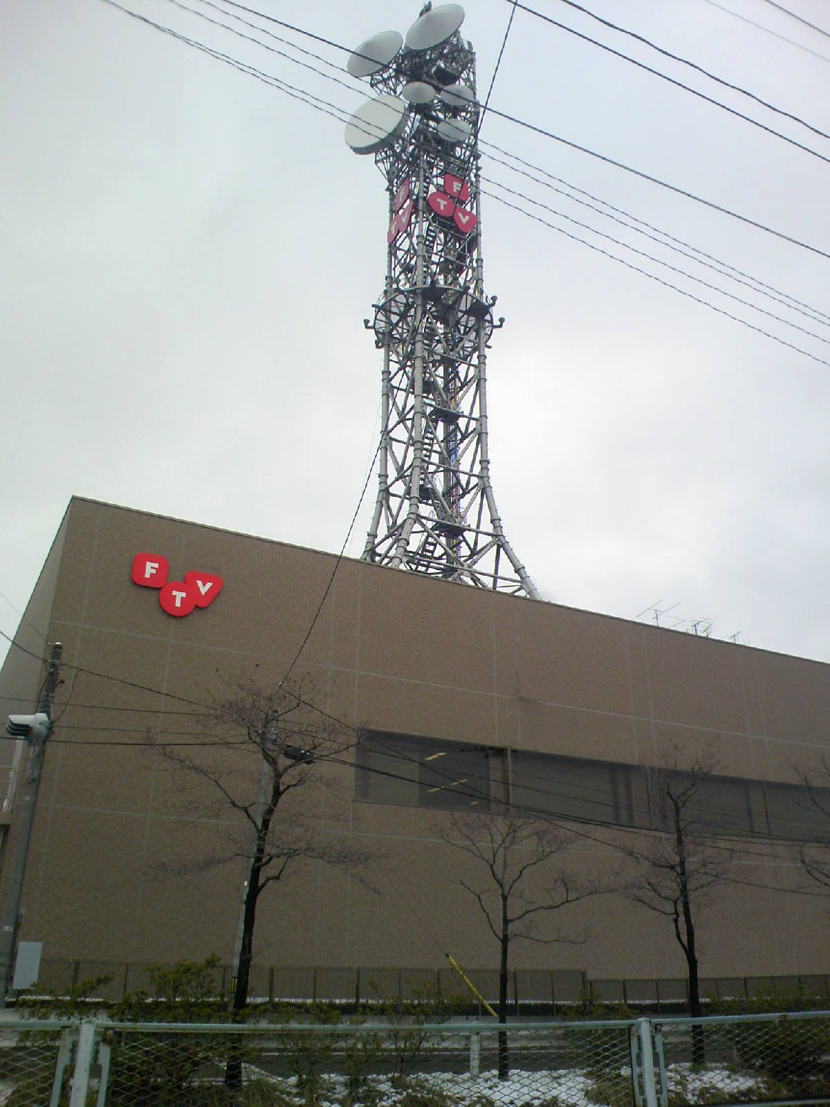 Fukushima Television Broadcasting Co.,Ltd. 福島テレビ本社